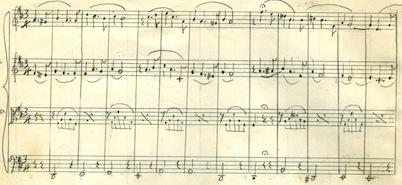 Partitura de la Patriótica Costarricense (1862), por Manuel María Gutiérrez, conservada en el Archivo Nacional de Costa Rica.